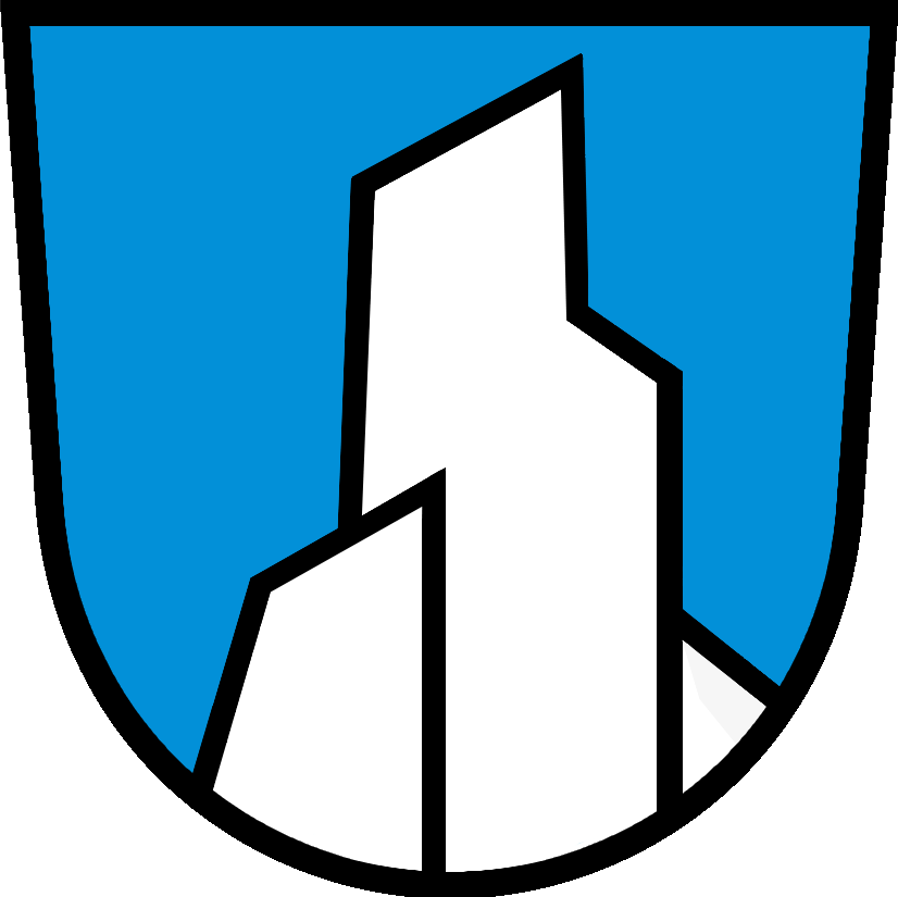 Wappen von Weissenstein